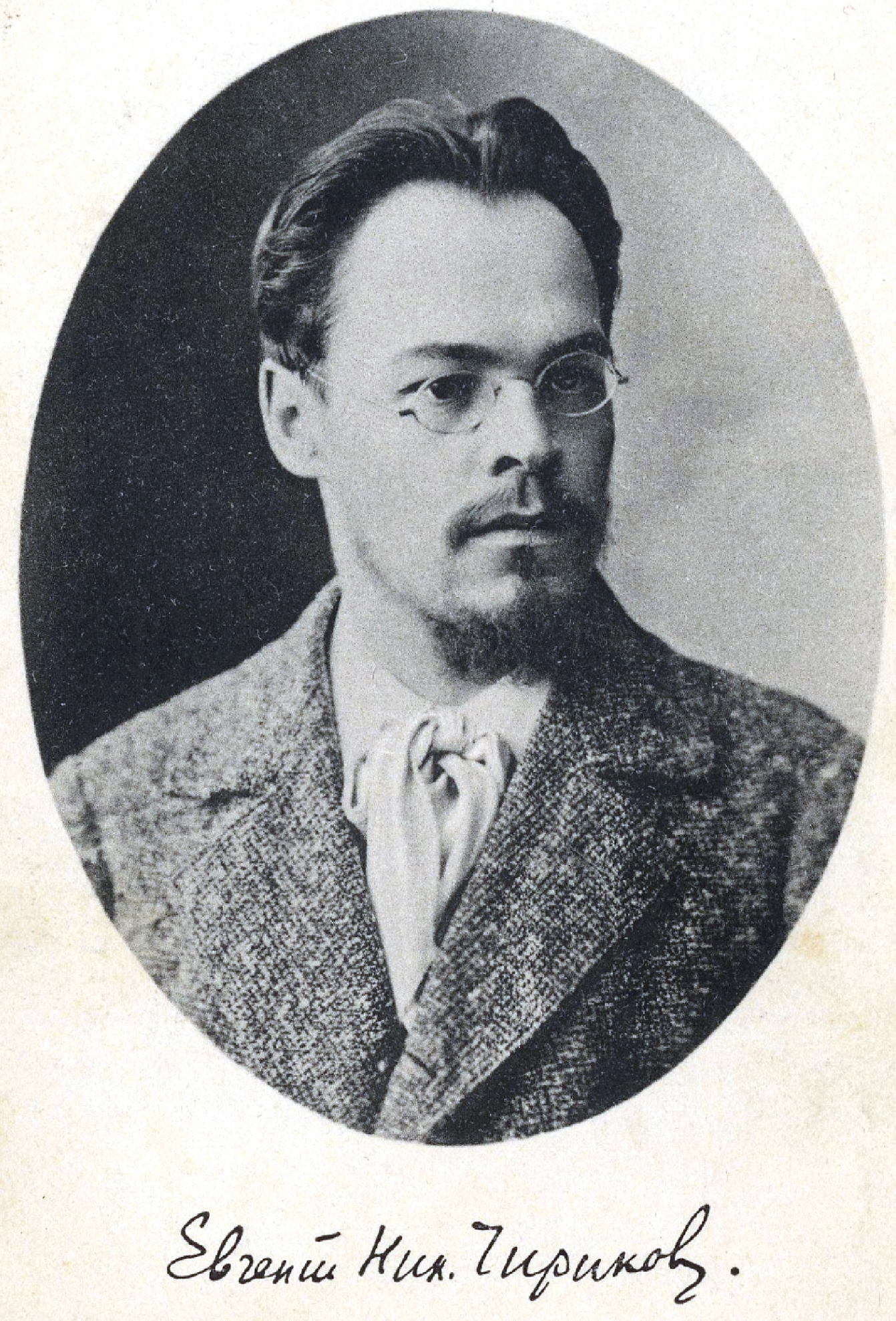 Чириков, Евгений Николаевич